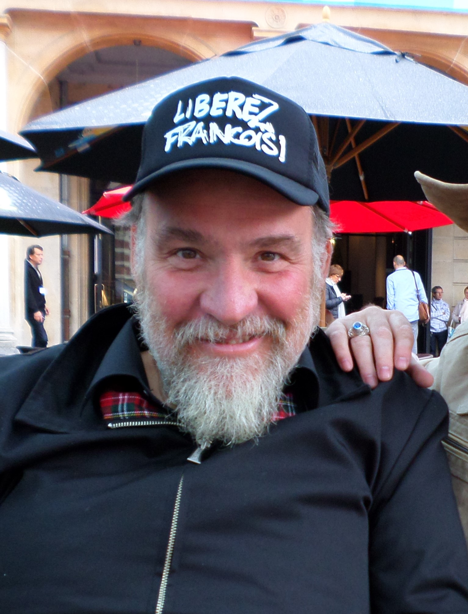 Bouli Lanners en 2013 pour Astérix.